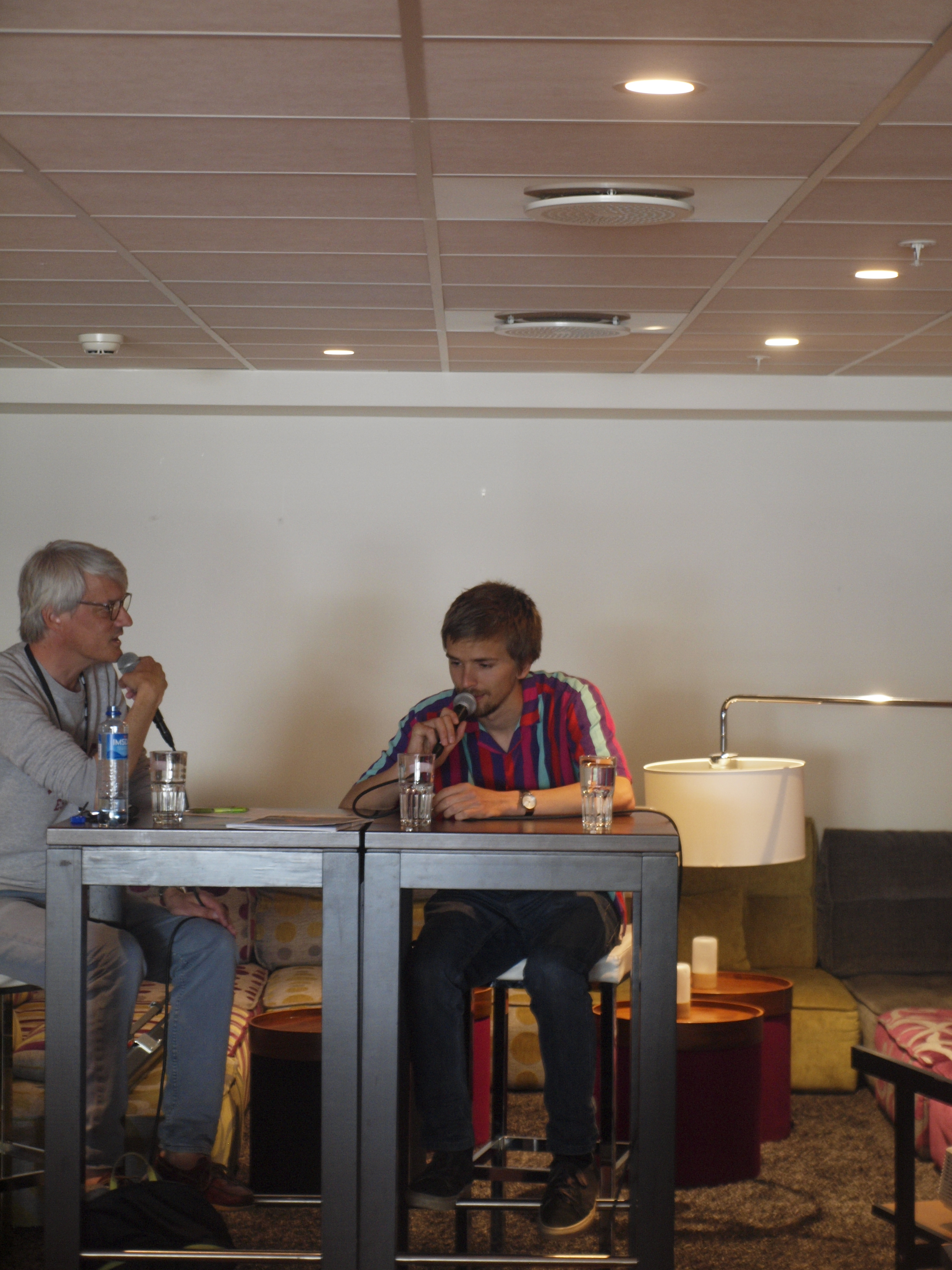 Alf Hulbækmo at Moldejazz 2019